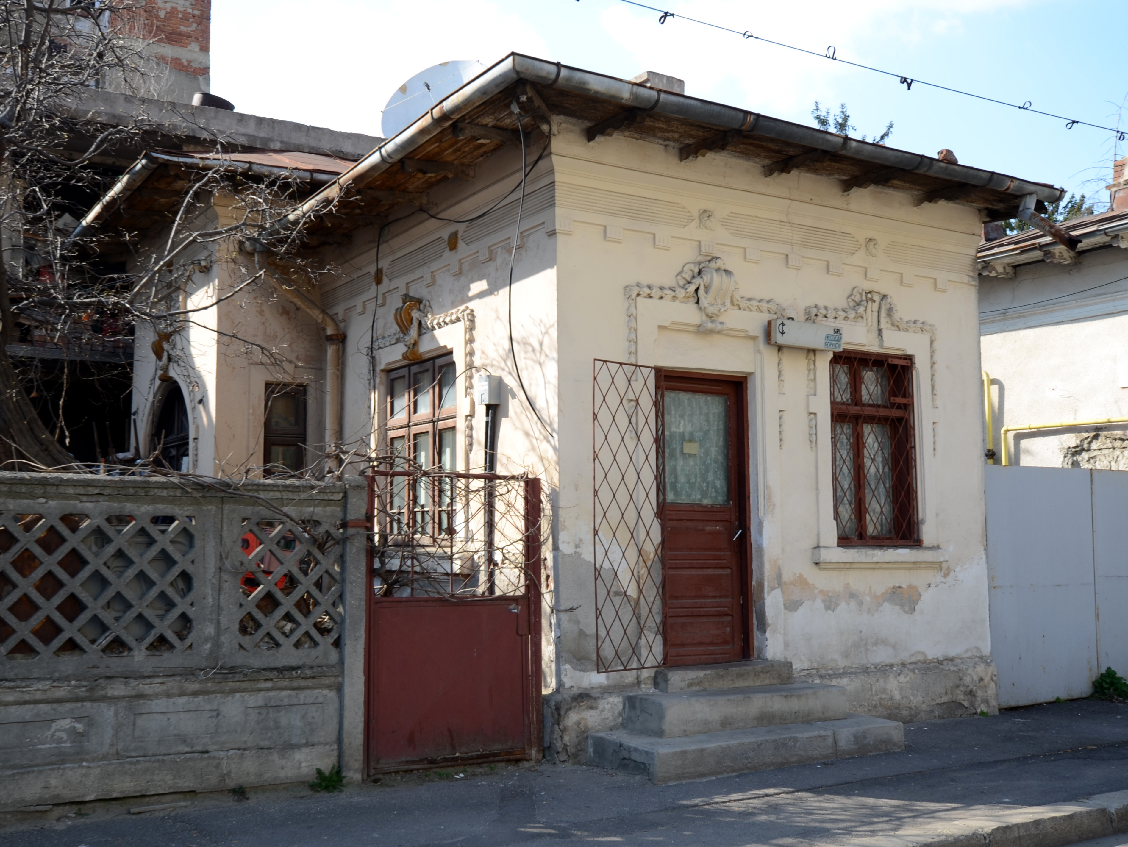 Casă, Str. Ion Minulescu nr. 100